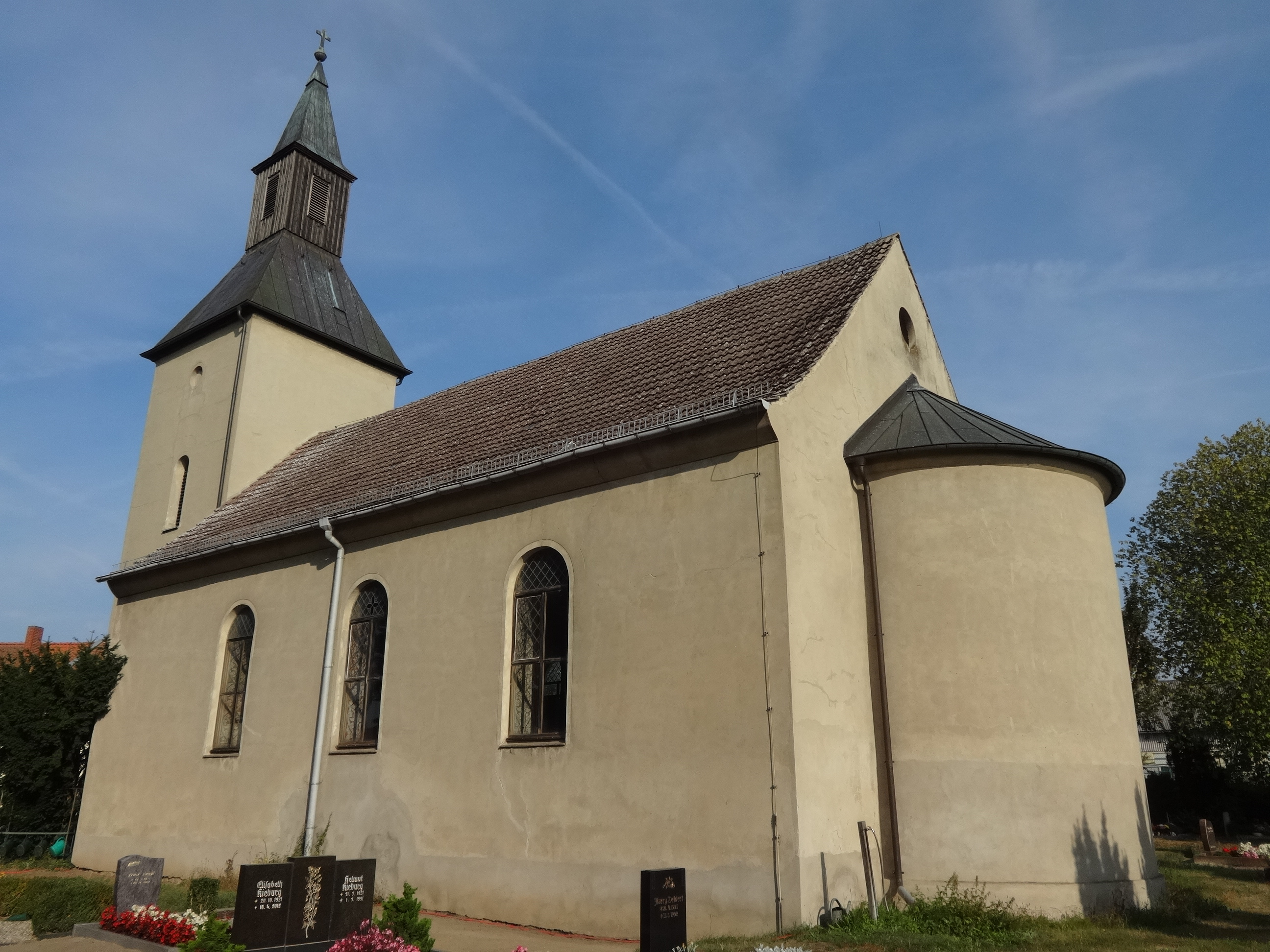 Die Kirche in Fresdorf entstand 1724 auf dem Fundament eines mittelalterlichen Vorgängerbaus. In dem schlichten Bauwerk steht ein Kanzelkorb aus dem Anfang des 18. Jahrhunderts.